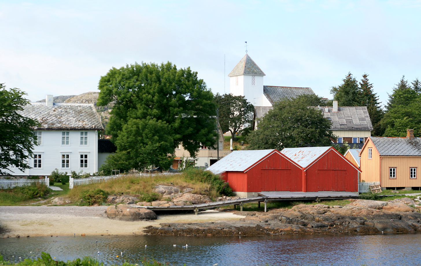 Rørvik,Nordtrøndelag, Norway.